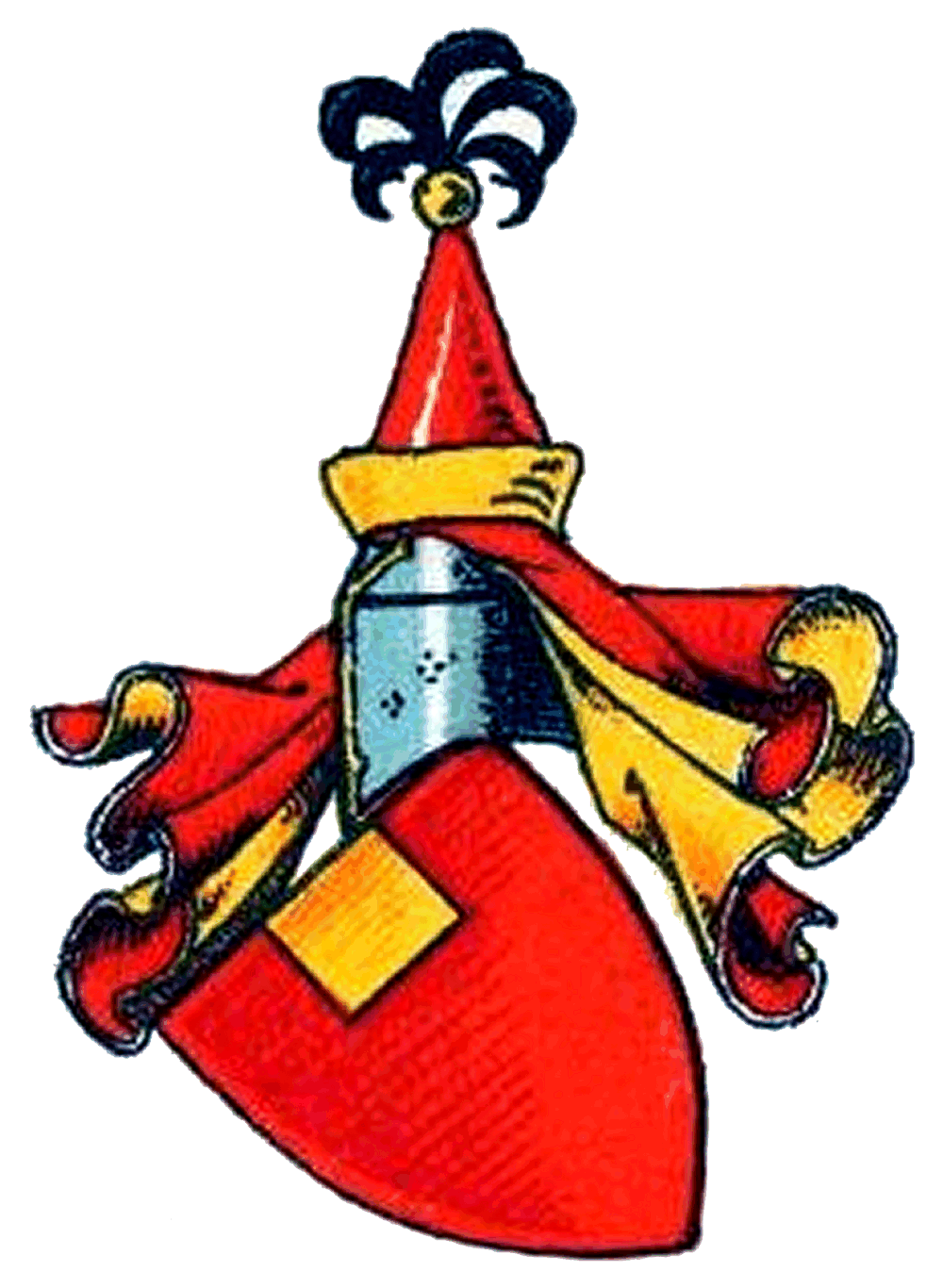 Stammwappen derer von Ueberacker